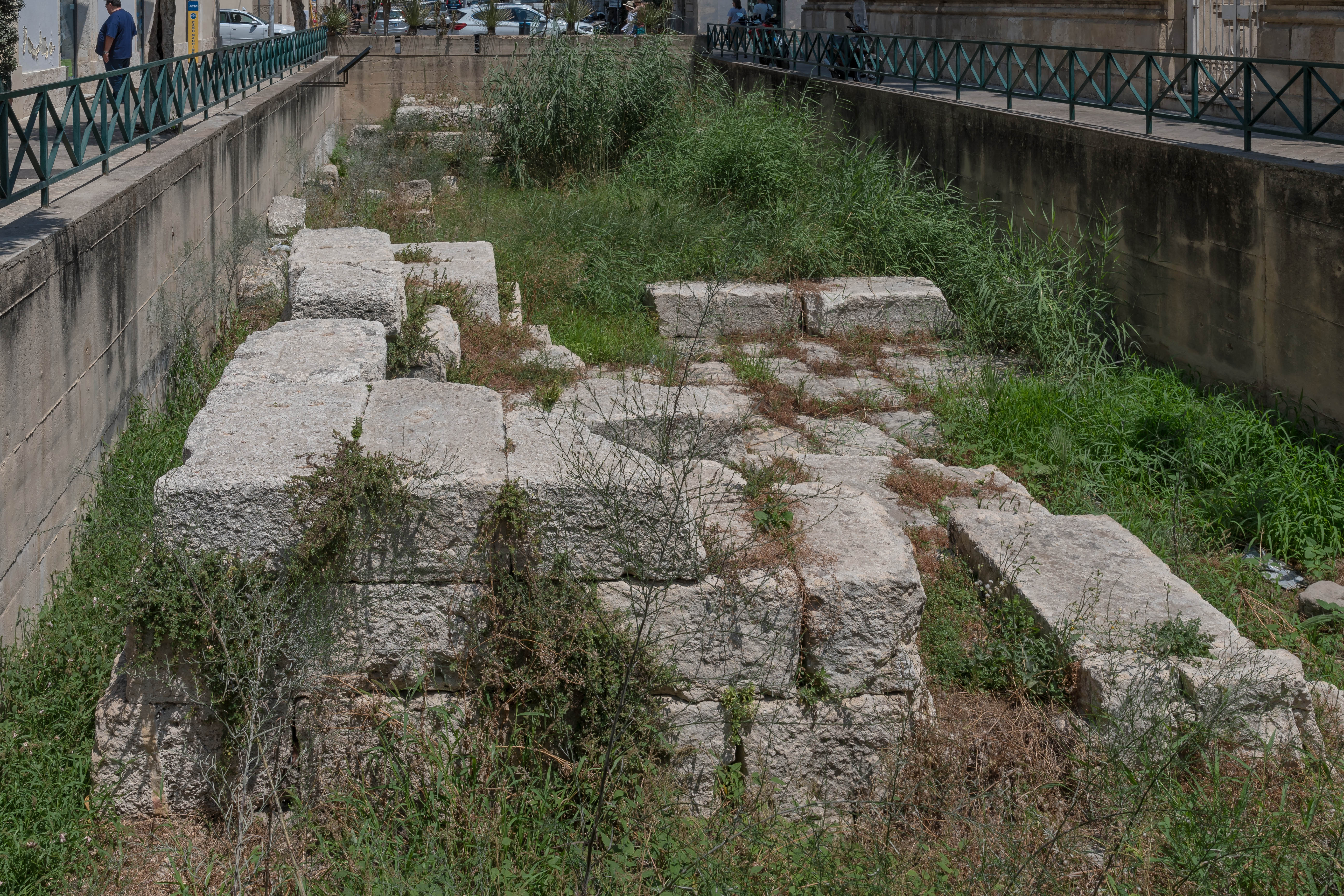 Erhaltener Stadtmauerabschnitt der Porta Urbica auf der Insel Ortygia (Syrakus) von der Südseite